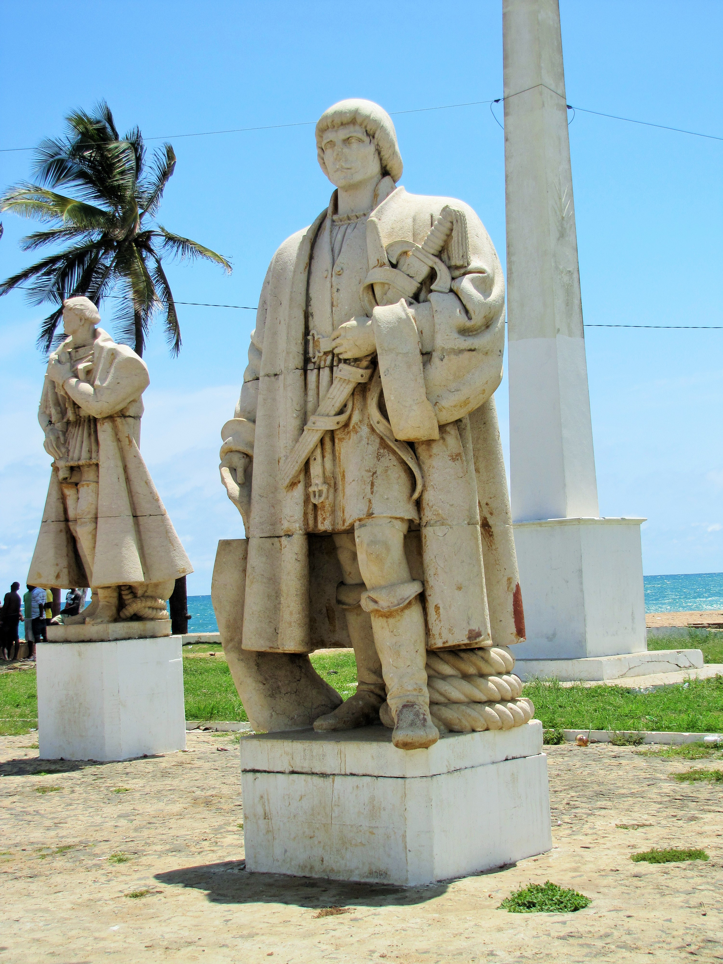 Forte de São Sebastião National Museum (São Tomé)